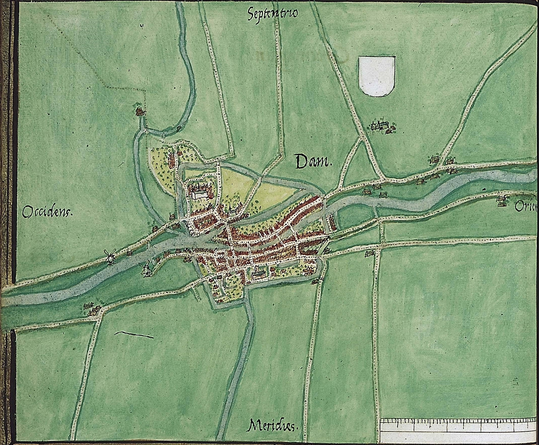 Kaart van Appingedam uit de atlas Planos de ciudades de los Países Bajos: Parte III